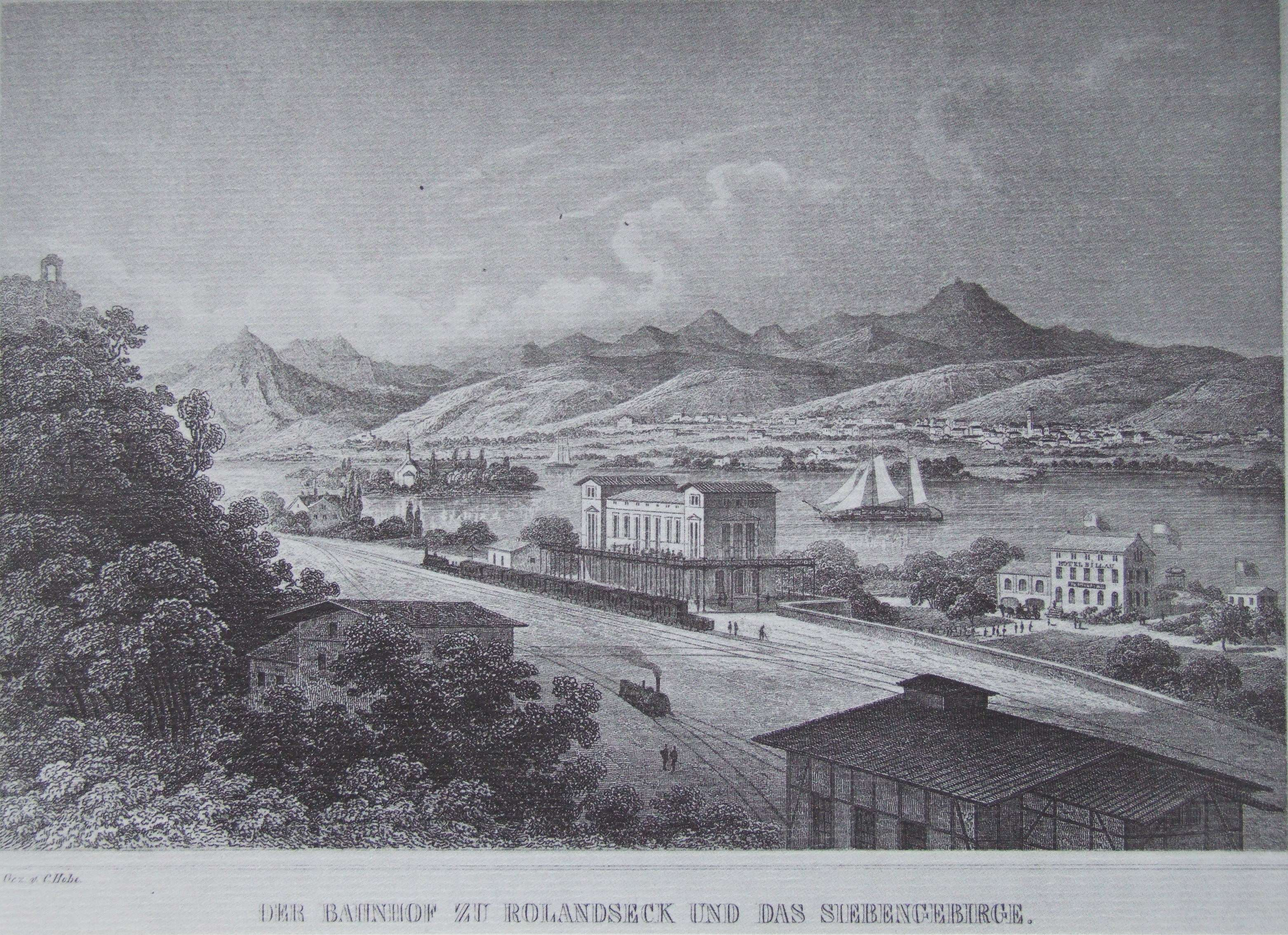 Der (1857) soeben fertig gestellte Bahnhof Rolandseck, daneben Hotel Billau, im Hintergrund Honnef mit Kirche und das Siebengebirge.